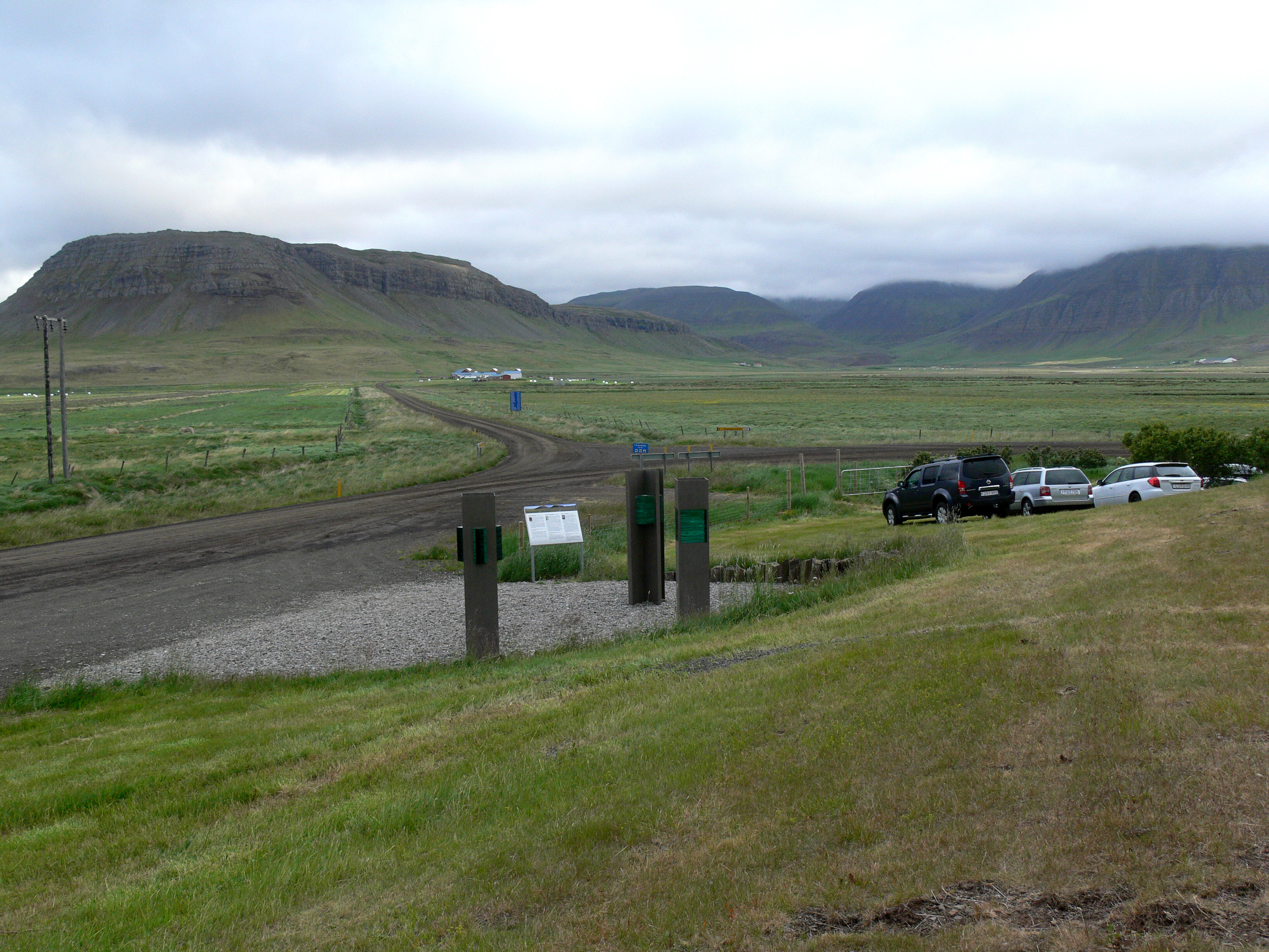 Staðarhólsdalur (Saurbær) von der Staðarhólskirkja aus. Nach der Laxdæla saga wurde Kjartan auf dem Rückweg von hier nach Hause erschlagen.